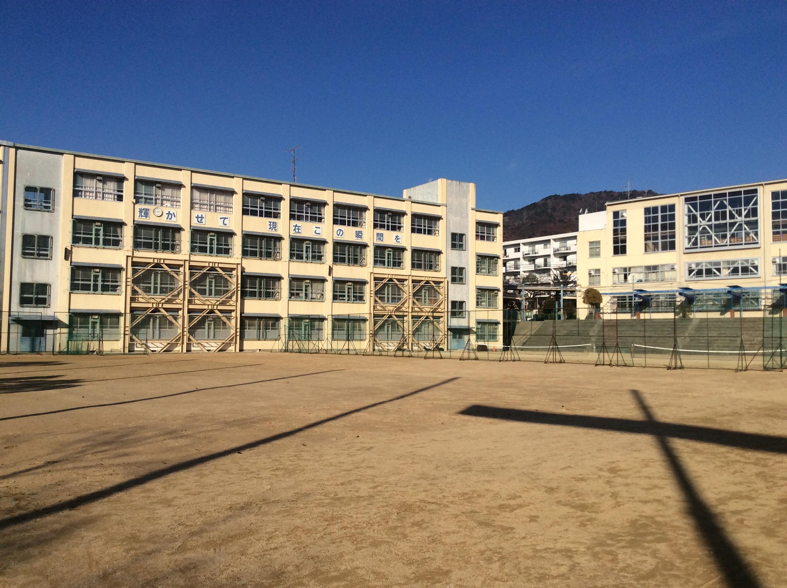 神戸市立住吉中学校